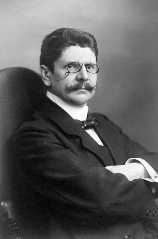 Landtagsabgeordneter Bell 1908